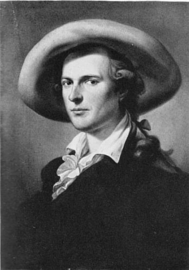 Der später namhafte Archäologe und Kunsthistoriker lebte 1782 als Cicerone in Rom. In Verbindung mit Karl Philipp Moritz gab er die Zeitschrift "Italien und Deutschland" (1789-1790) heraus. Seine "reiche, fast vollständige Empirie" zog den Dichter Goethe an, obwohl seine Theorie der Künste von der Goethischen abwich. 1797 besuchte Hirt in Weimar Goethe und vermittelte die Berufung des Architekten Gentz für den Weimarer Schloßbau. 1817, als Hirt von seiner letzten Italienreise zurückkehrte, sahen sich die römischen Kunstfreunde zum letzten Male. Kunstforscher S105